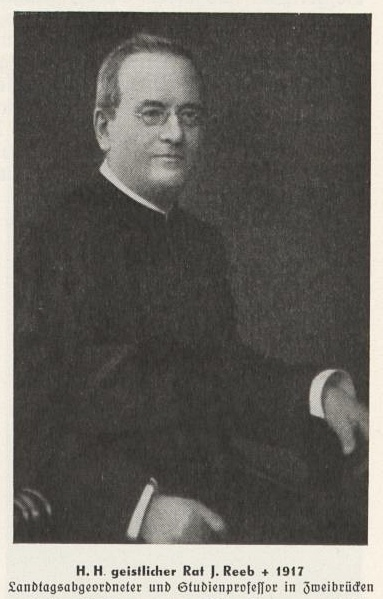 Jakob Reeb (1842-1917) katholischer Priester und bayerischer Landtagsabgeodneter